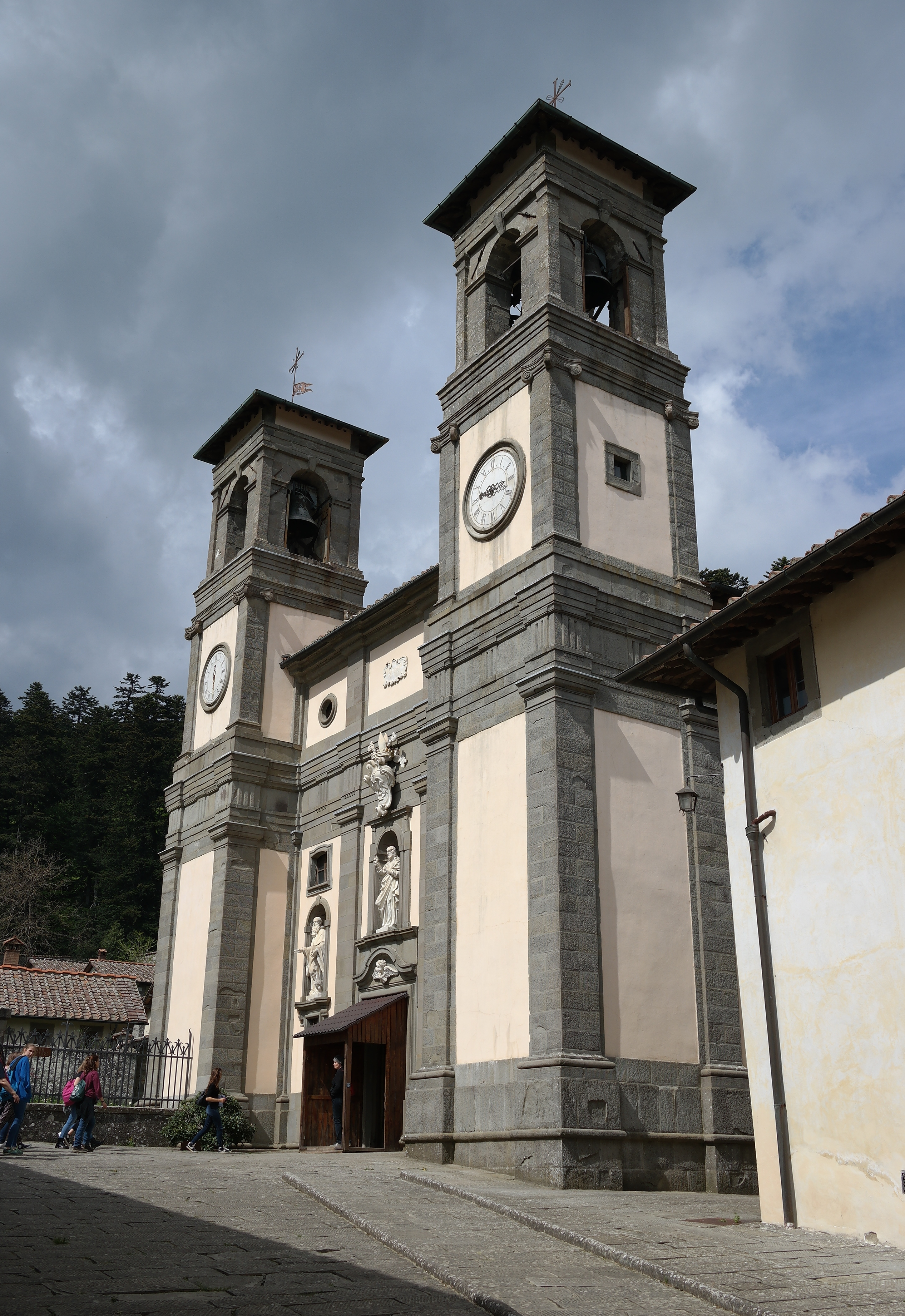 Facciata della Chiesa nell'Eremo di Camaldoli